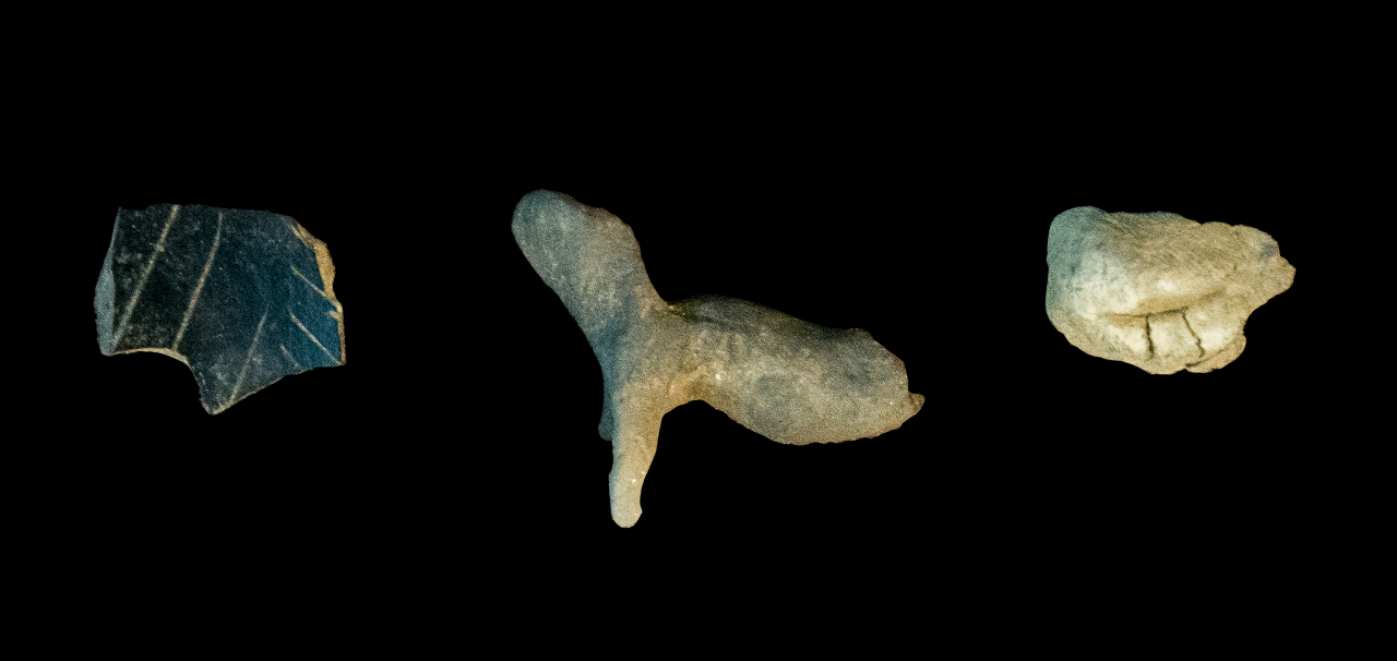 Krems-Wachtberg: Gebranntes Elfenbeinfragment mit geritzten Linien, zoomorphe Tonfigur und Keramikstück mit Fingernagelabdruck. Ausgestellt im Urgeschichtemuseum MAMUZ Schloss Asparn an der Zaya, Österreich.